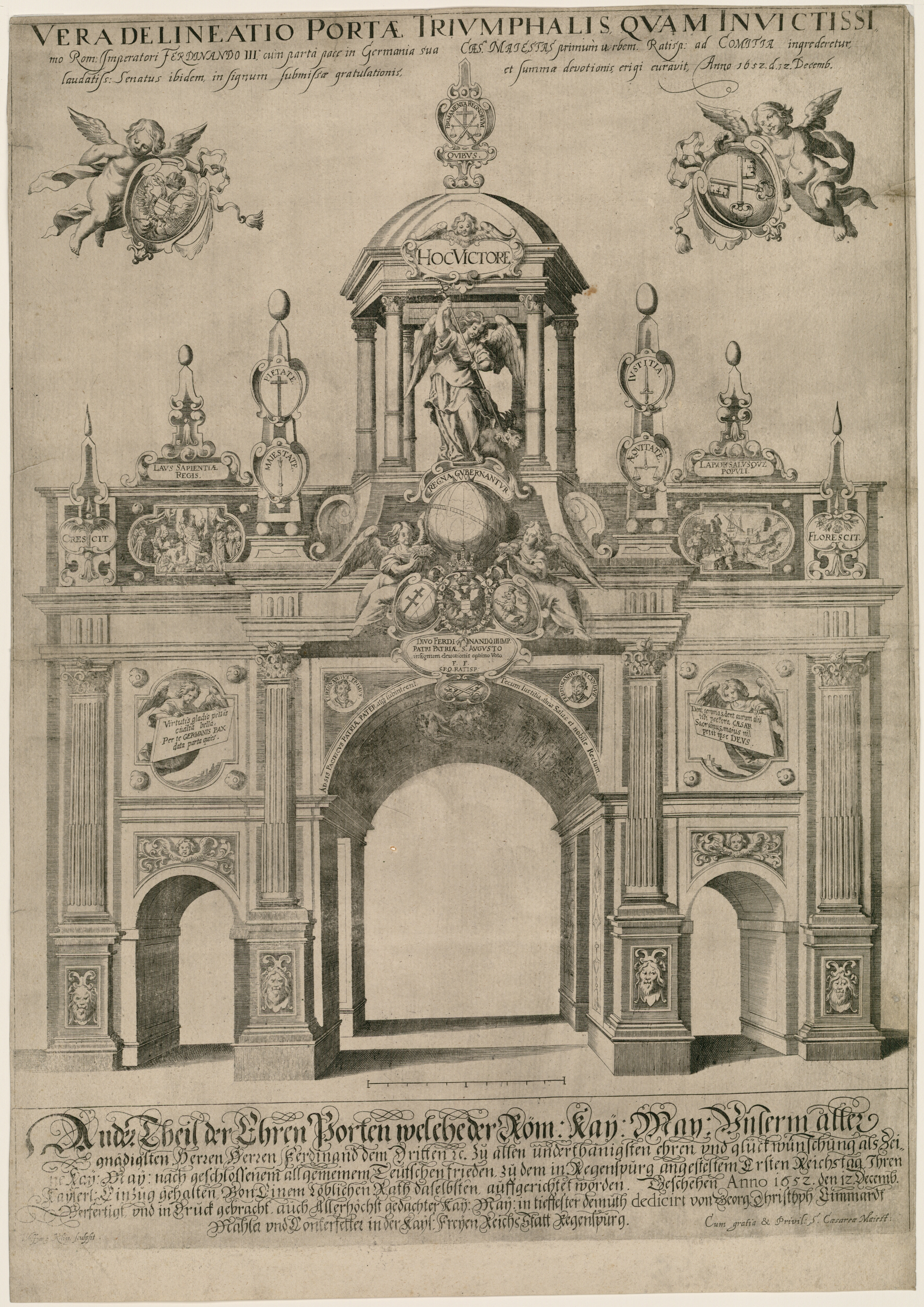 Kupferstich - Triumphbogen für Kaiser Ferdinand III. anlässlich seines Einzugs in Regensburg am 12. Dezember 1652 zur Eröffnung des Reichstages.